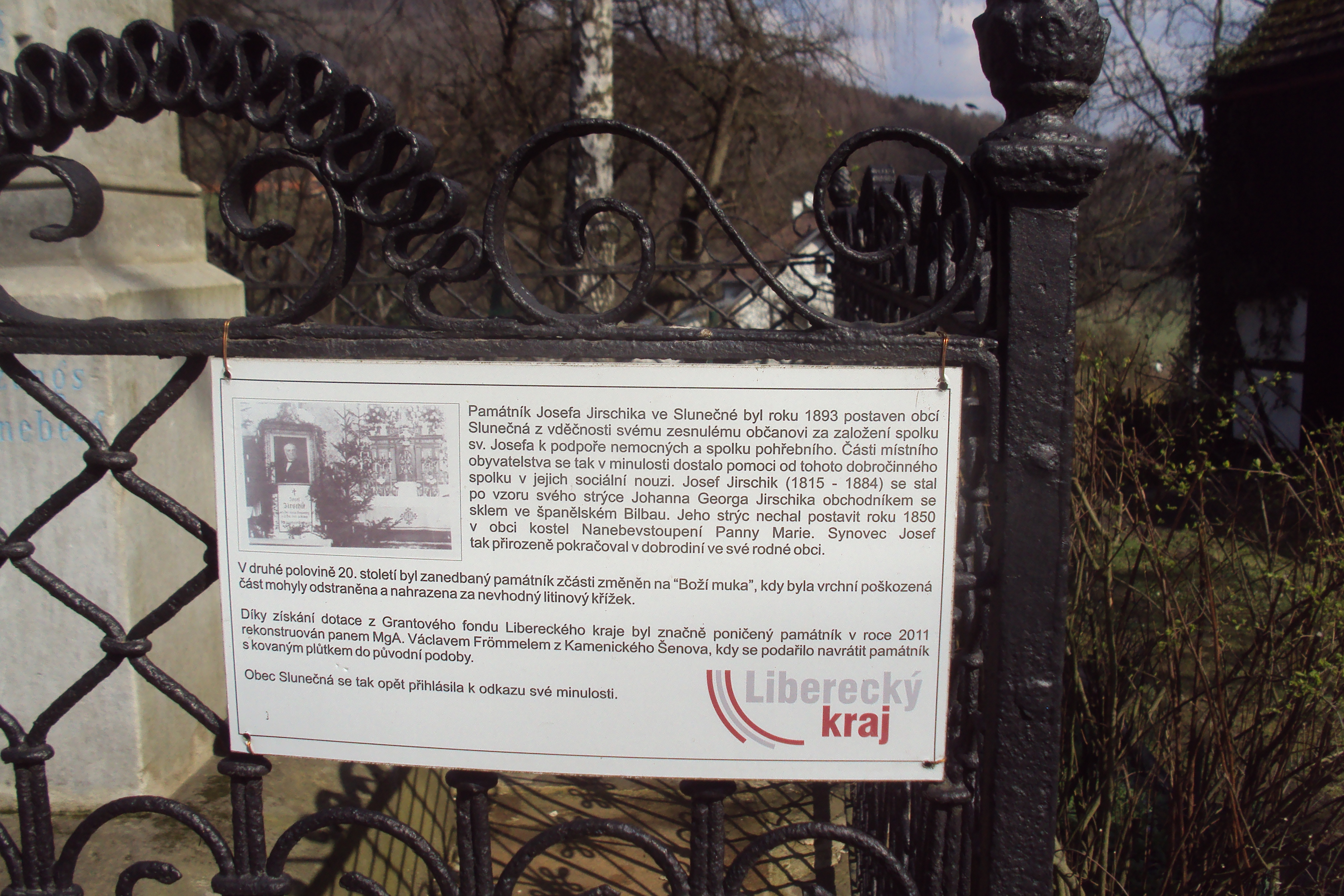 Cedulka u pomníku rodáka Jirschika v obci Slunečná na Českolipsku